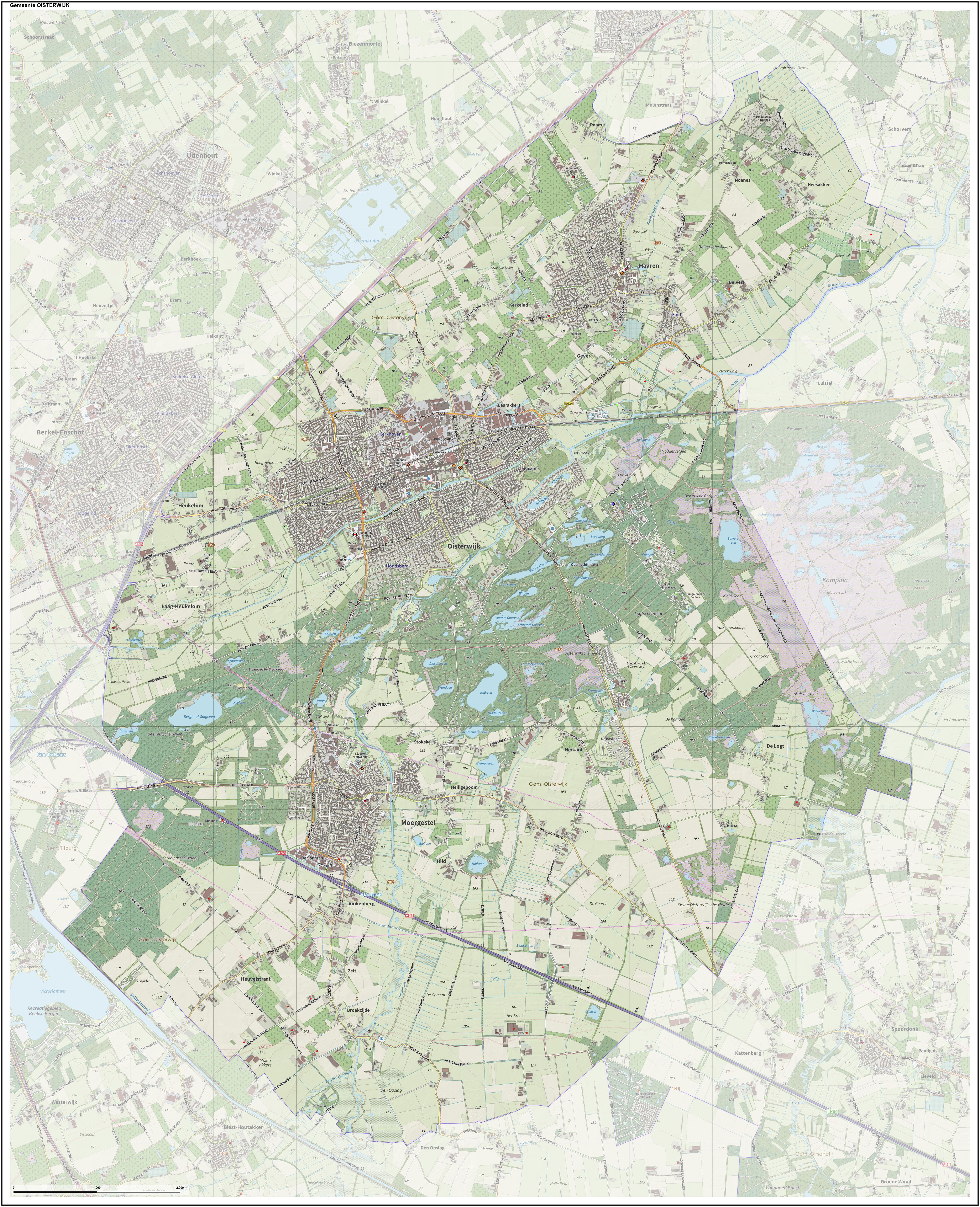 Topografische gemeentekaart. Resolutie: 400 pixels/km. Kaartbeeld samengesteld uit de open geodata van de Top10NL en Top25namen (Kadaster), Creative Commons-BY licentie. Gebouwvlakken uit open geodata BAG extract. Wegen uit de OpenStreetMap, OpenStreetMap community. Reliëfschaduw uit de Actuele Hoogtekaart AHN2. Samenstelling en kleurenschema: Jan-Willem van Aalst, met QGIS. Zie ook de Legenda.